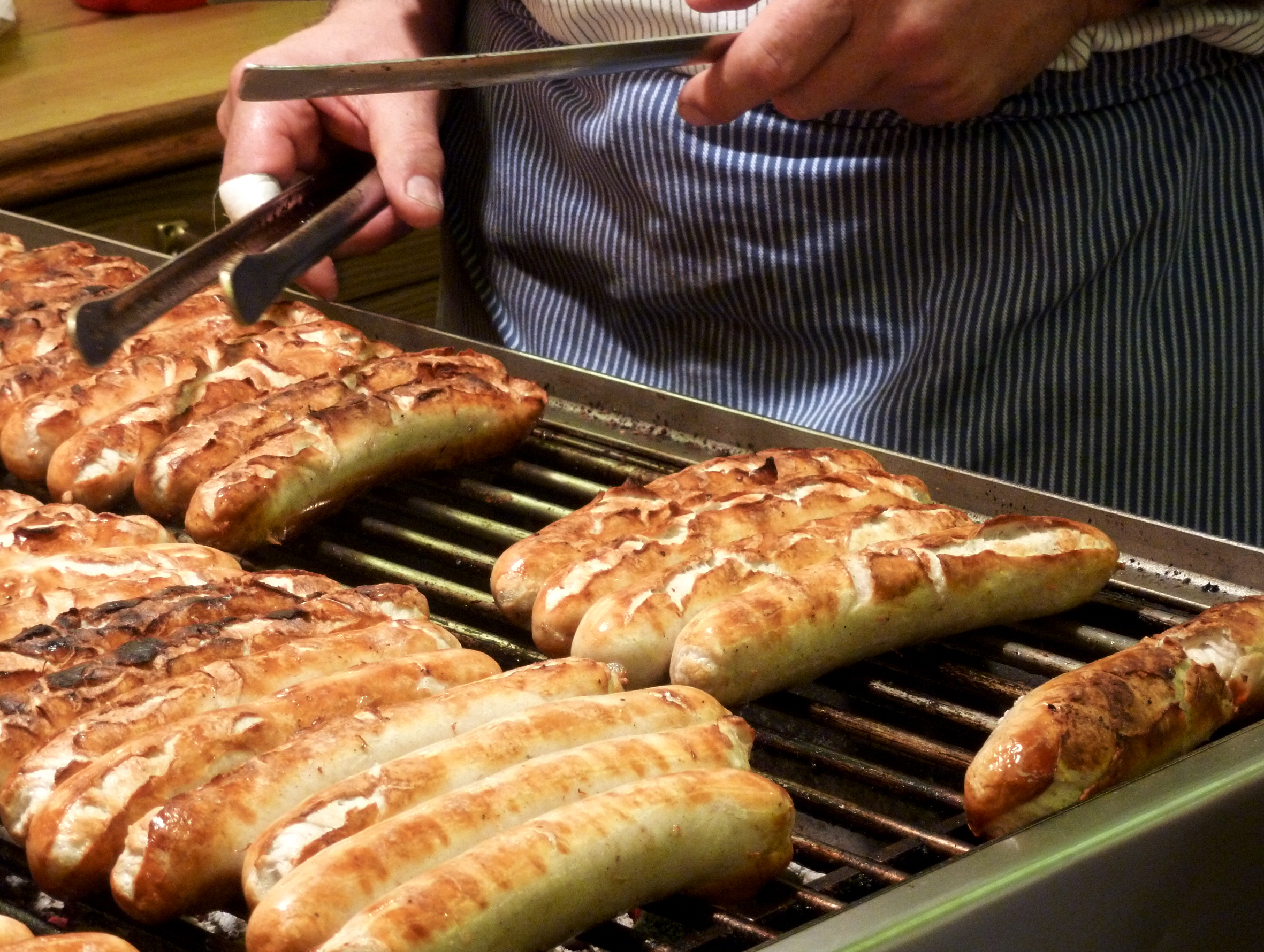 Bratwürste auf dem Grill. Fotografiert auf dem Weihnachtsmarkt in Münster, DE.